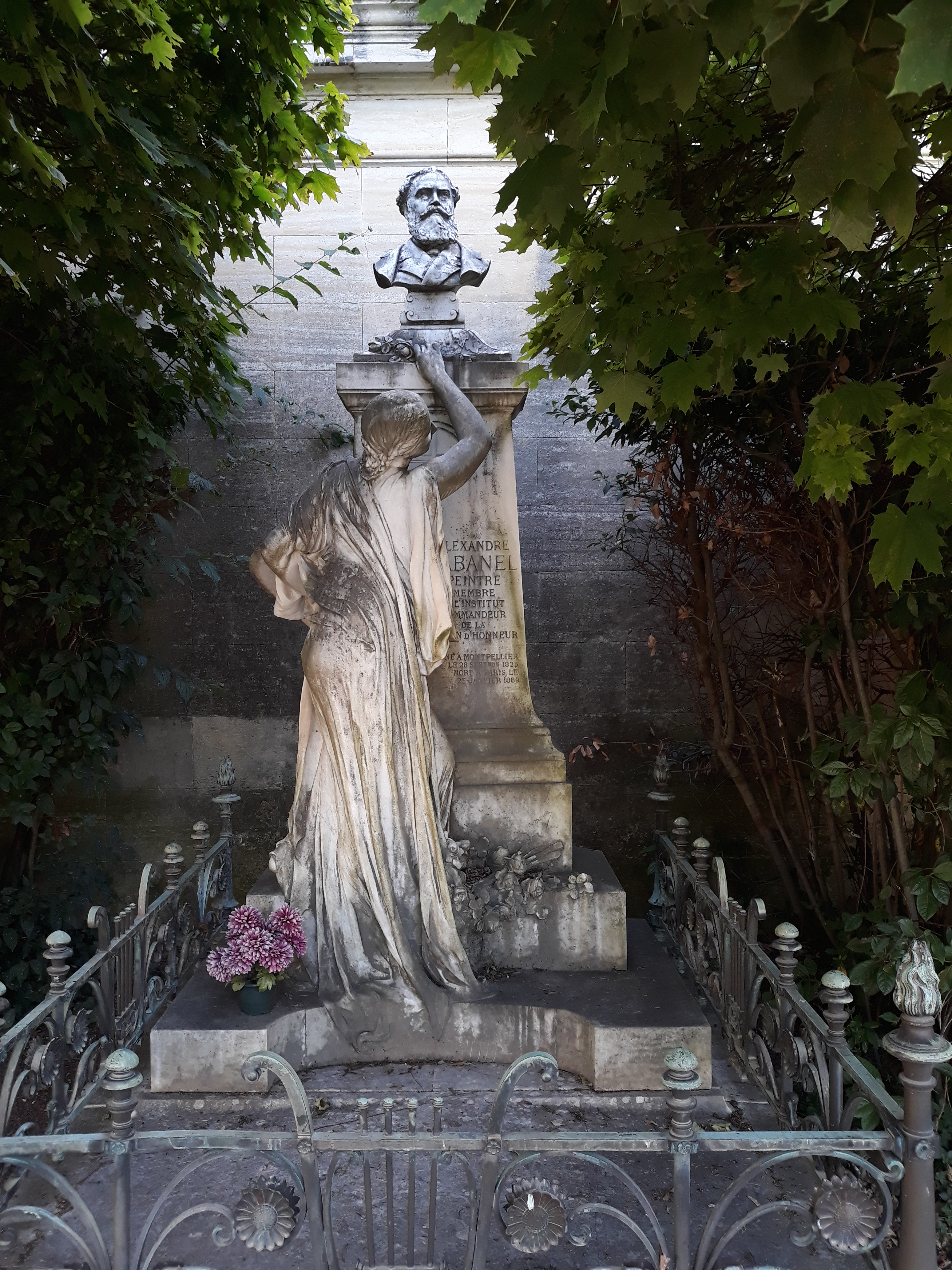 Das Grab des französischen Malers Alexandre Cabanel auf dem Cimetière Saint-Lazare in Montpellier.